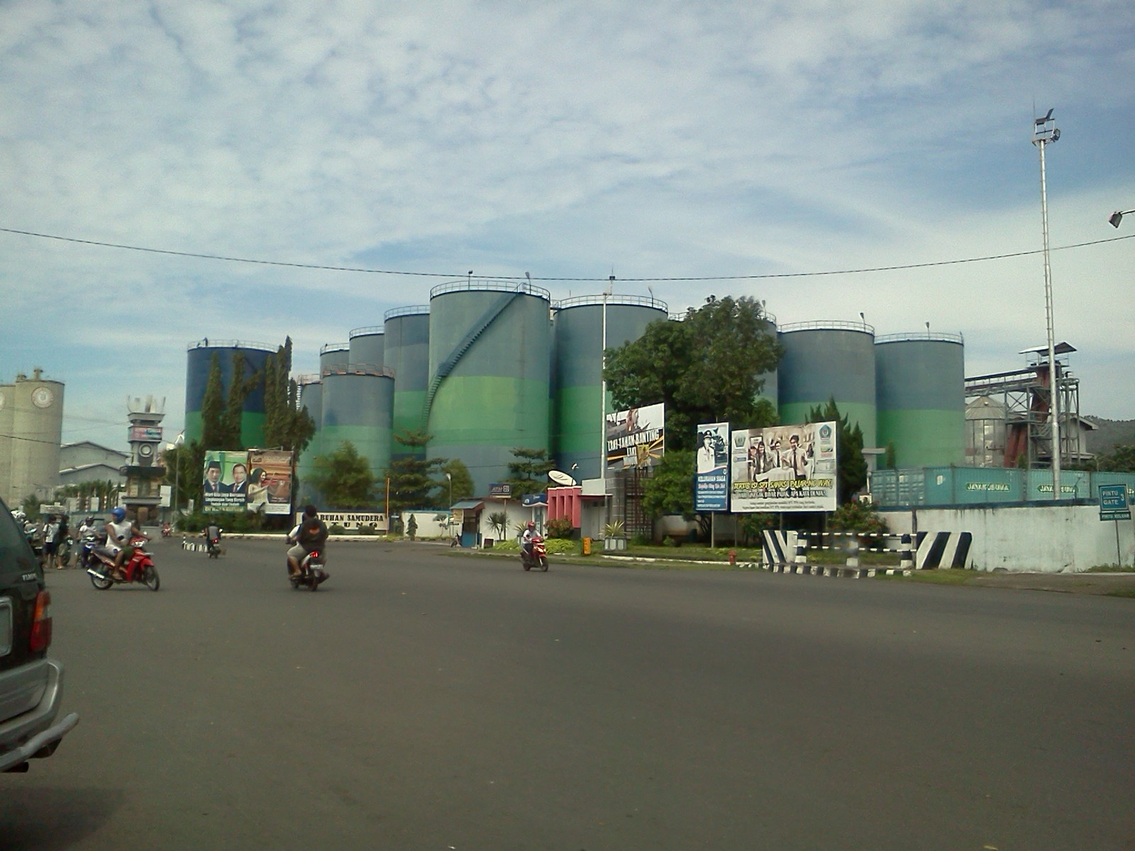 Kota Bitung